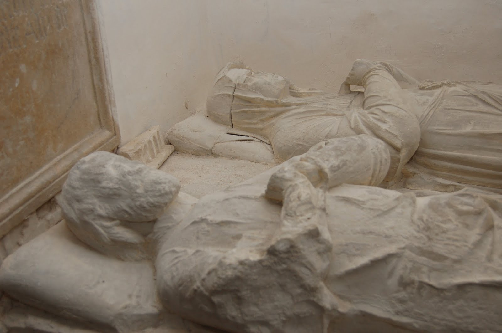 Forcelles-Saint-Gorgon (Meurthe-et-Moselle, France), église de la Conversion de St Paul, gisants de membres de la famille de Forcelles.